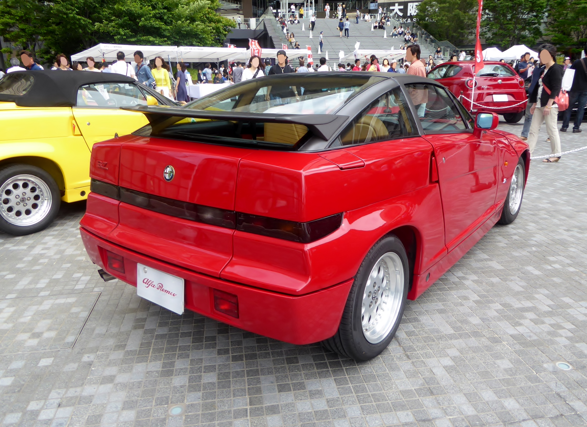 アルファロメオ・SZをリアから撮影。